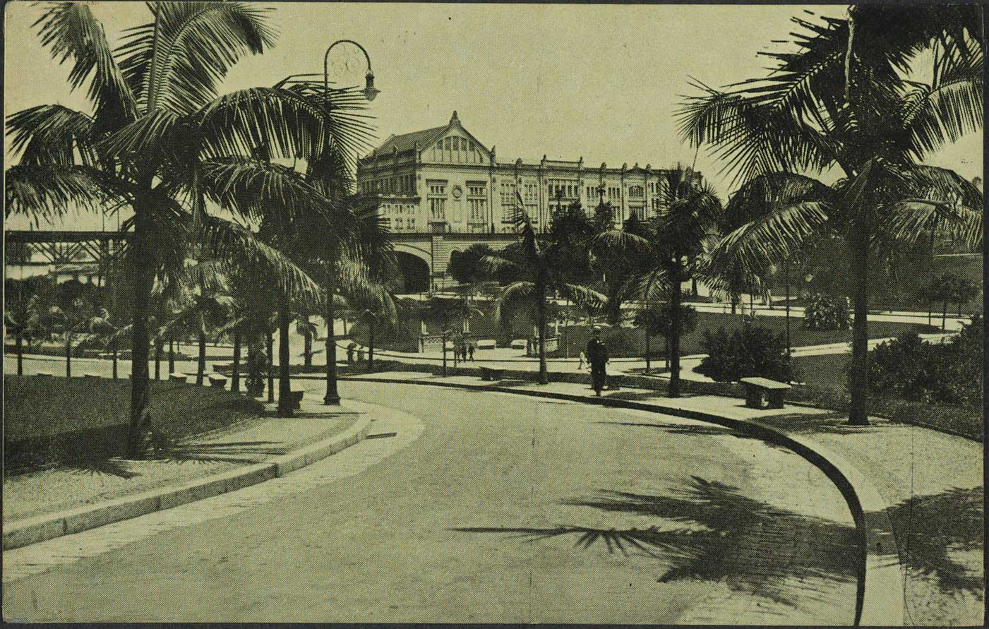 Antigo Parque Anhangabaú com vista para Theatro São José na década de 1920.